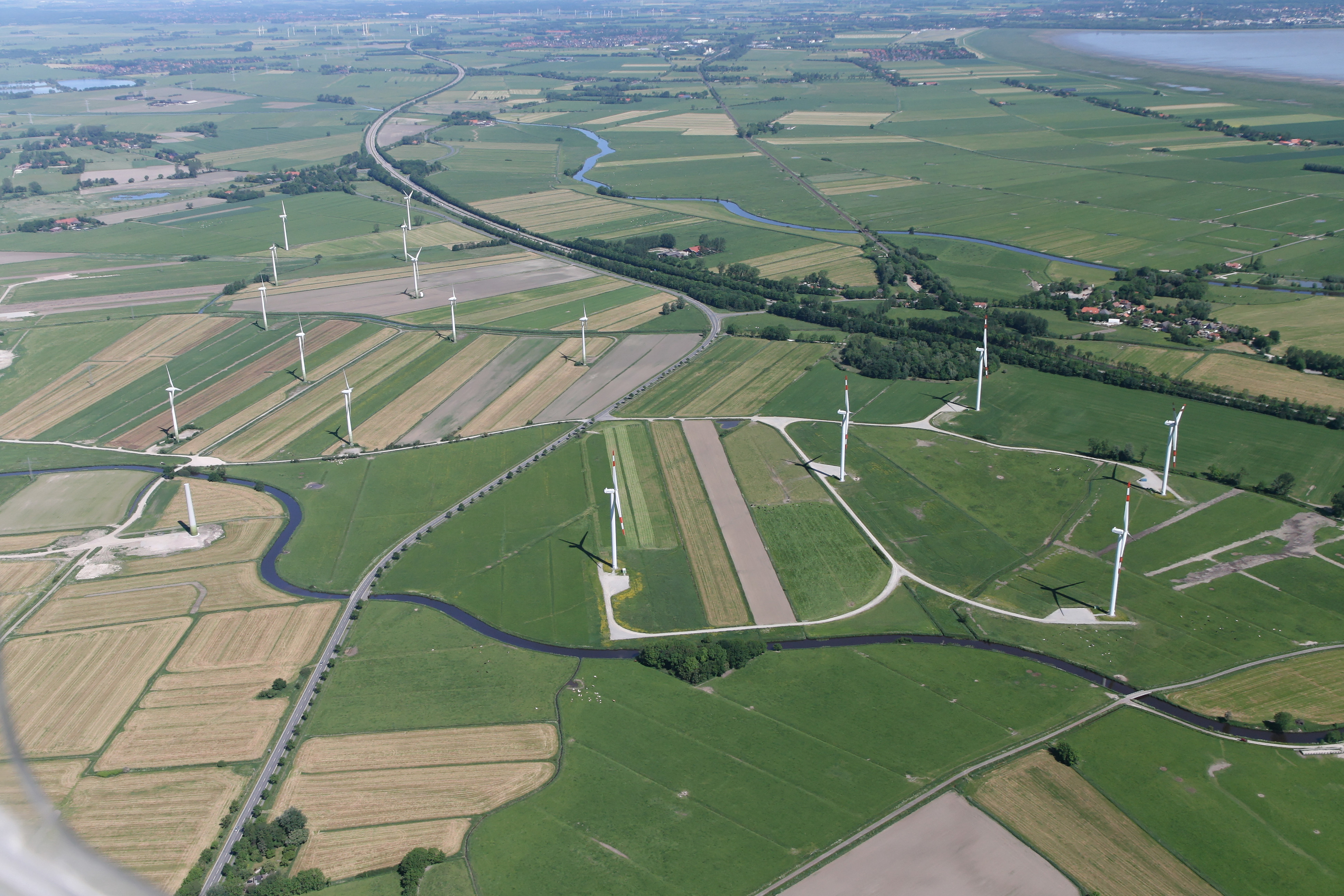 Windpark an der Bundesautobahn 29.